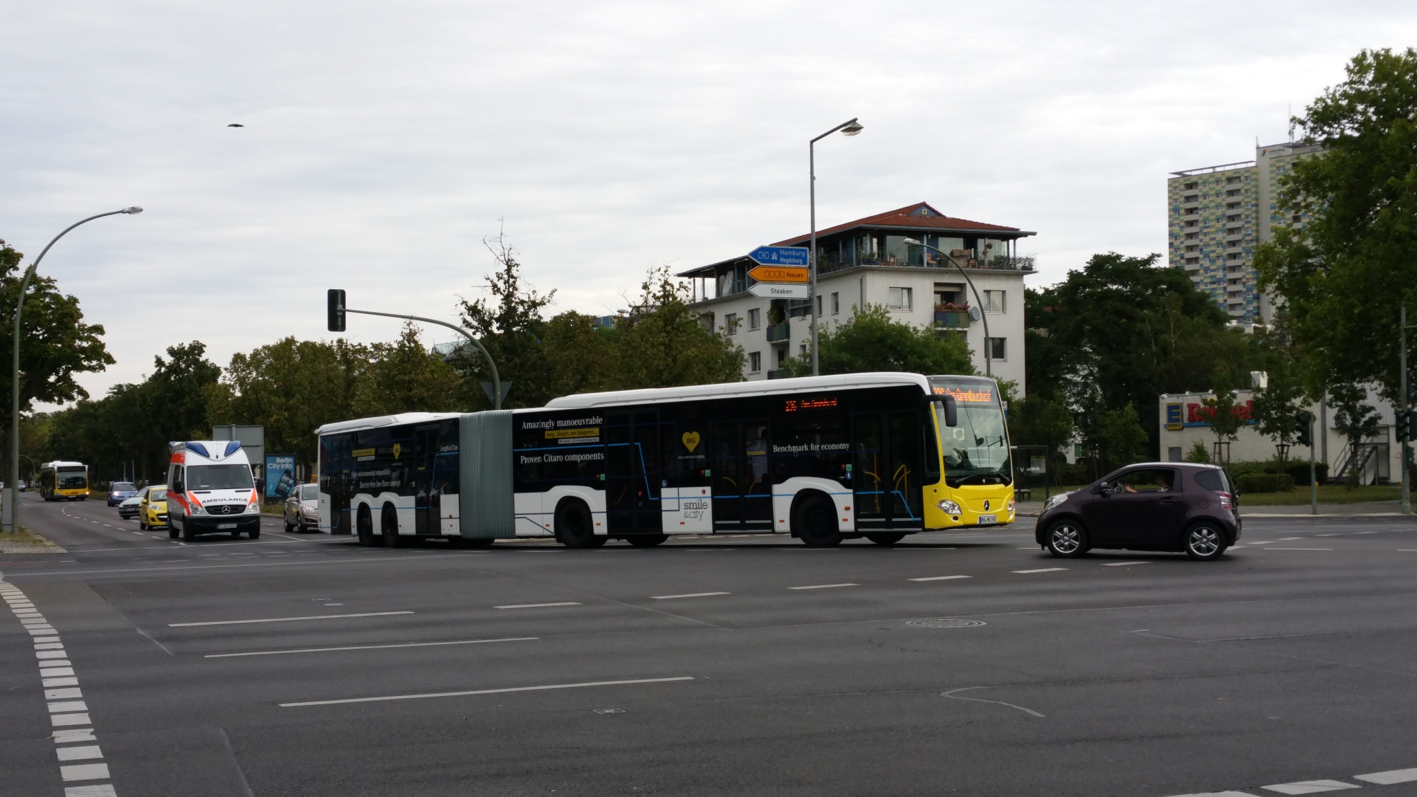 Überlanger Mercedes Gelenkbus im Testbetrieb bei der BVG